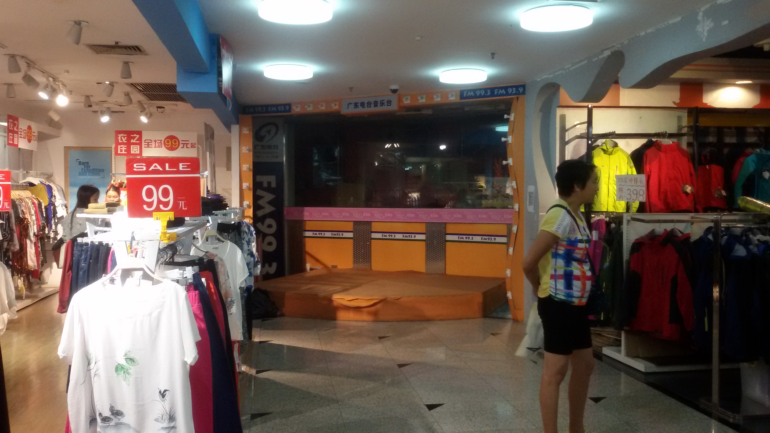 粵語: 廣東電台音樂之聲FM993試過喺東川路海印名店運動城3樓設演播室。